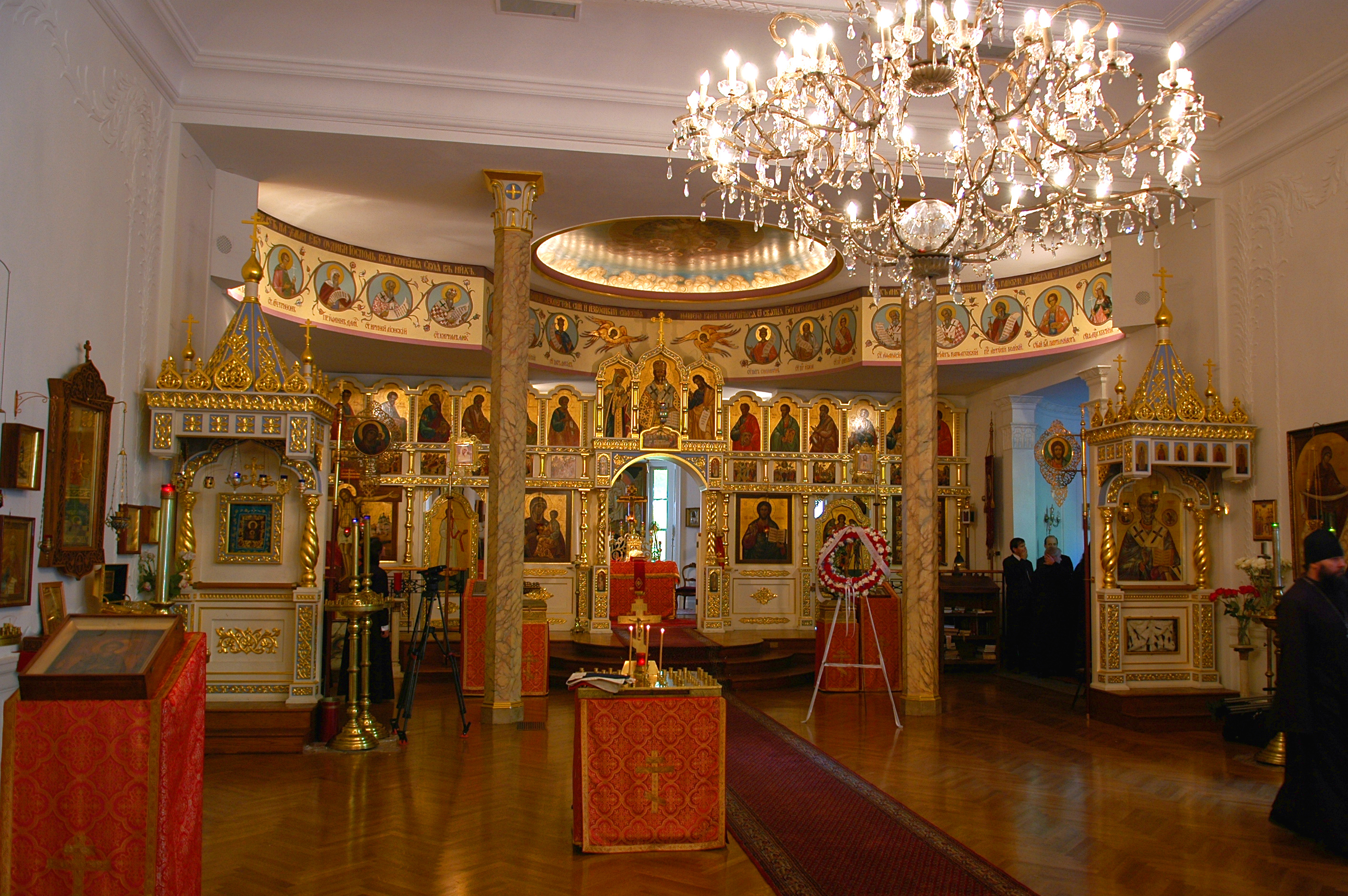 Знаменский собор Русской Зарубежной Церкви в Нью-Йорке.